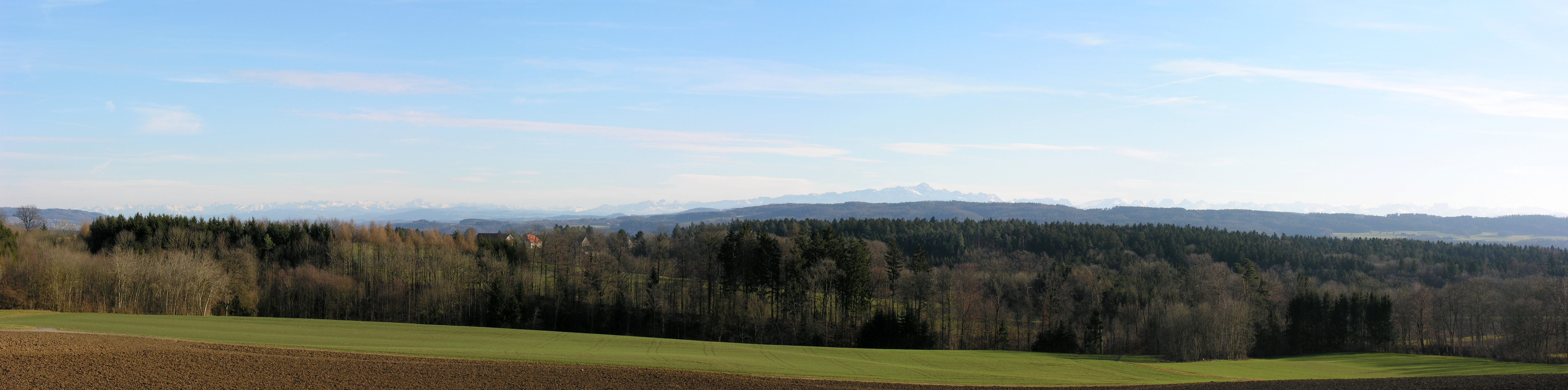 Switzerland, Thurgau, Alps seen from Herdern